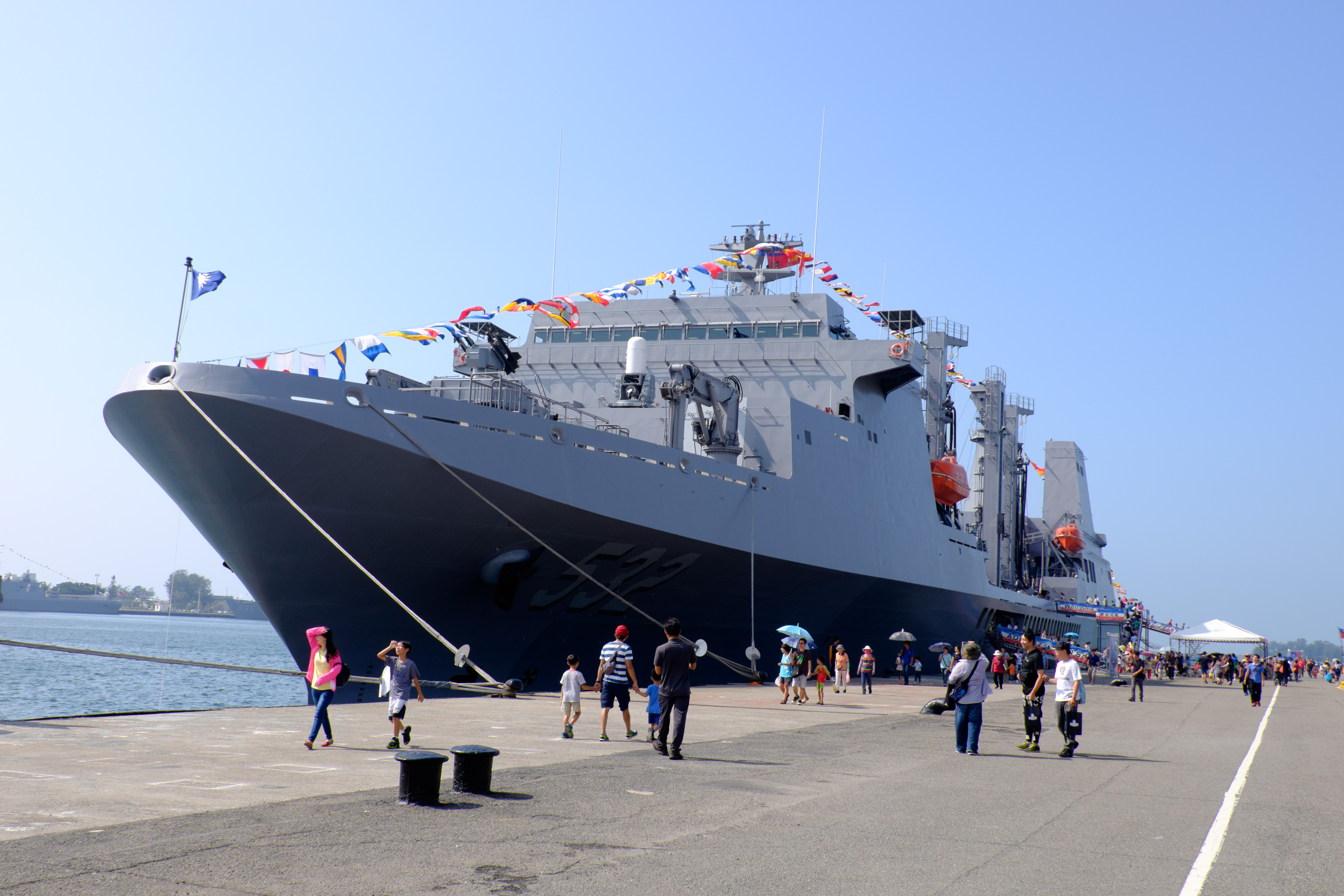 2015年左營軍港營區開放活動，停泊東三號碼頭的油彈補給艦磐石（AOE-532）。